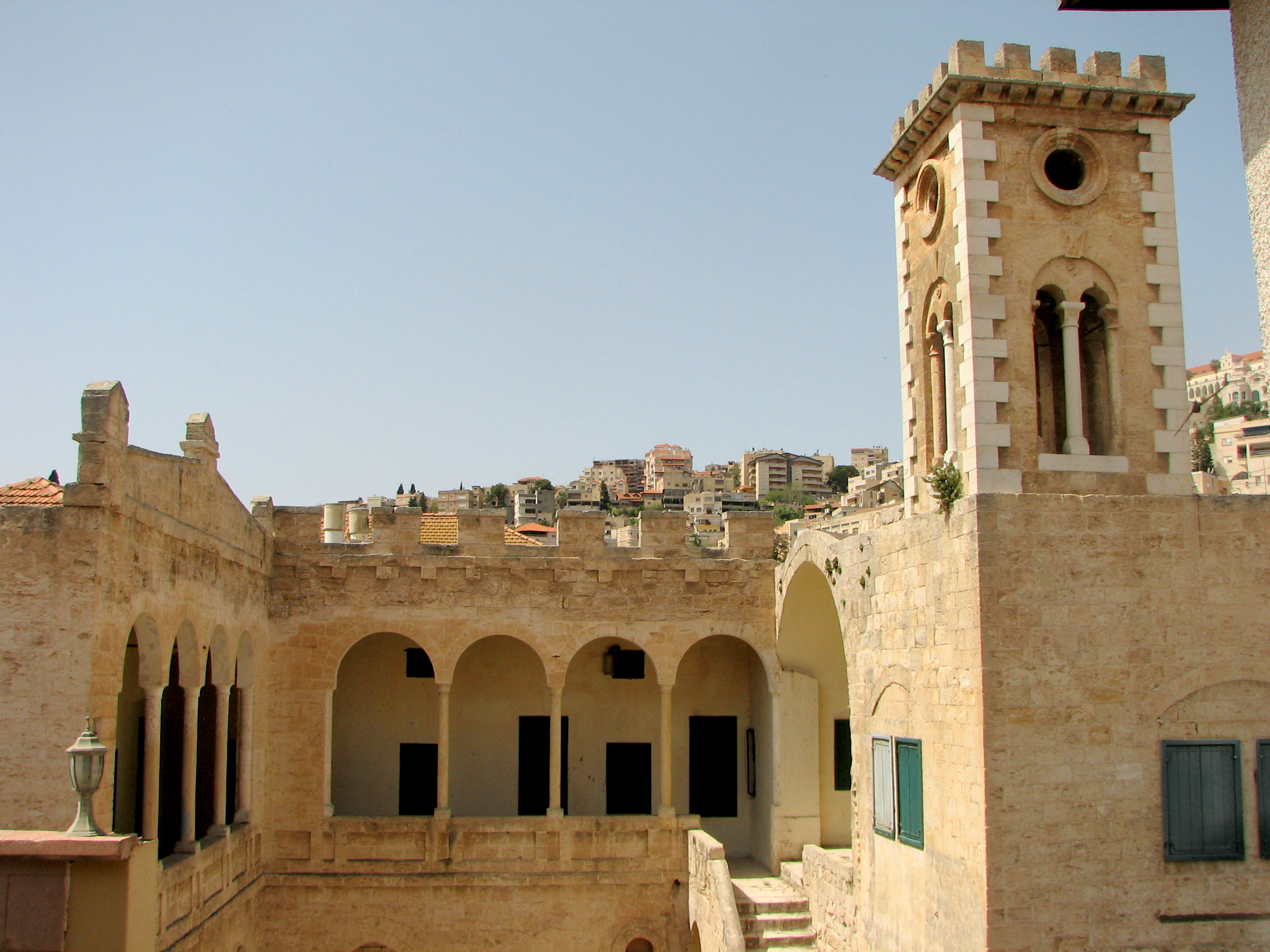 Saraya Building Nazareth was built by Daher el-Omar in 1740. The bulding was used as Governmental center בית הסראייה בעיר נצרת, הוא מבנה שהקים דאהר אל-עומר, שליט הגליל באמצע המאה ה-18, ואשר שימש כמרכז השלטוני בעיר. הבניין בין שתי הקומות הוקם בסביבות שנת 1740. הבניין שימש עד שנת 1991 כבית עיריית נצרת